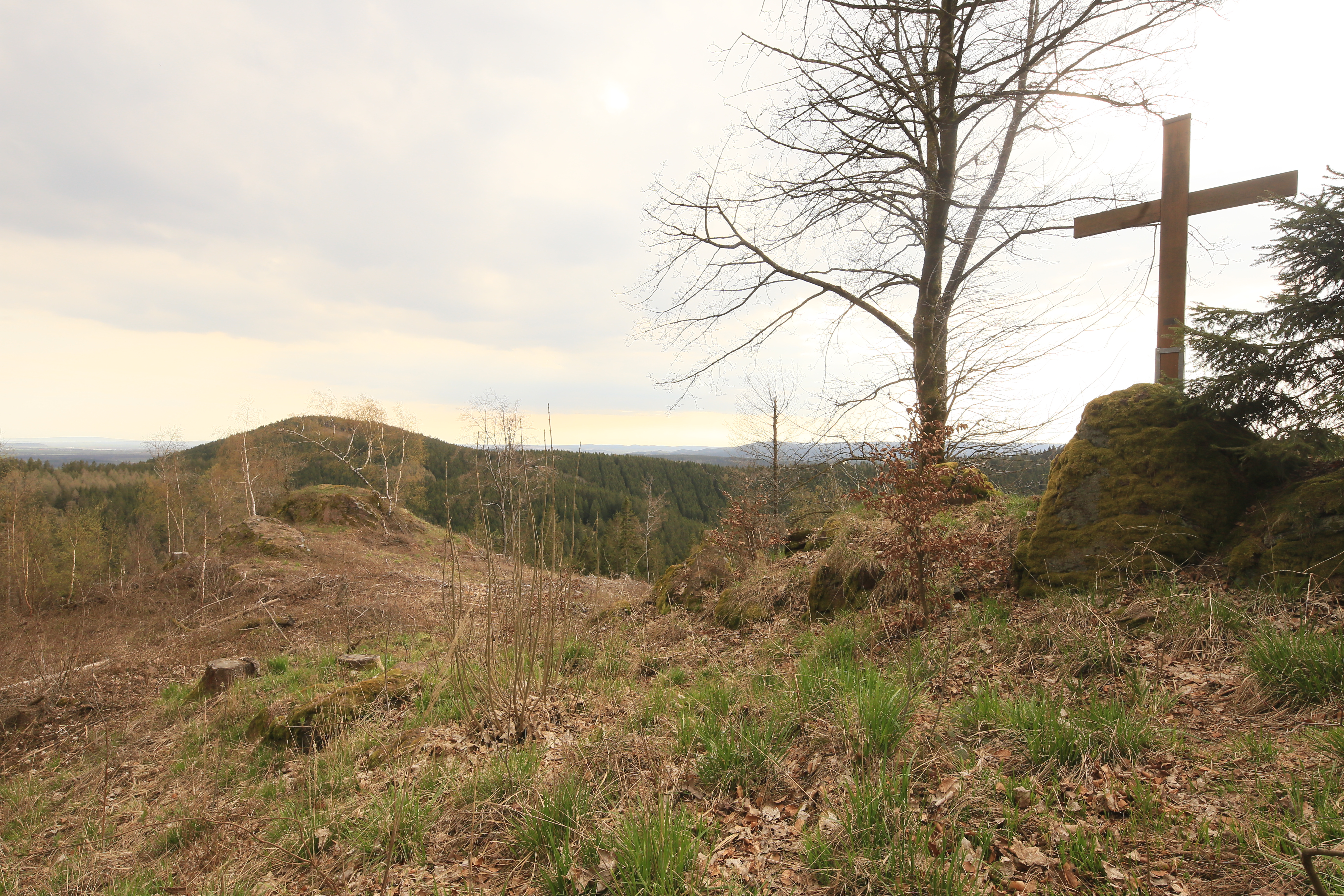 hinter dem Kreuz erhebt sich die höher gelegene Hauptburg, ein kleines Plateau kann Standort der Vorburg sein